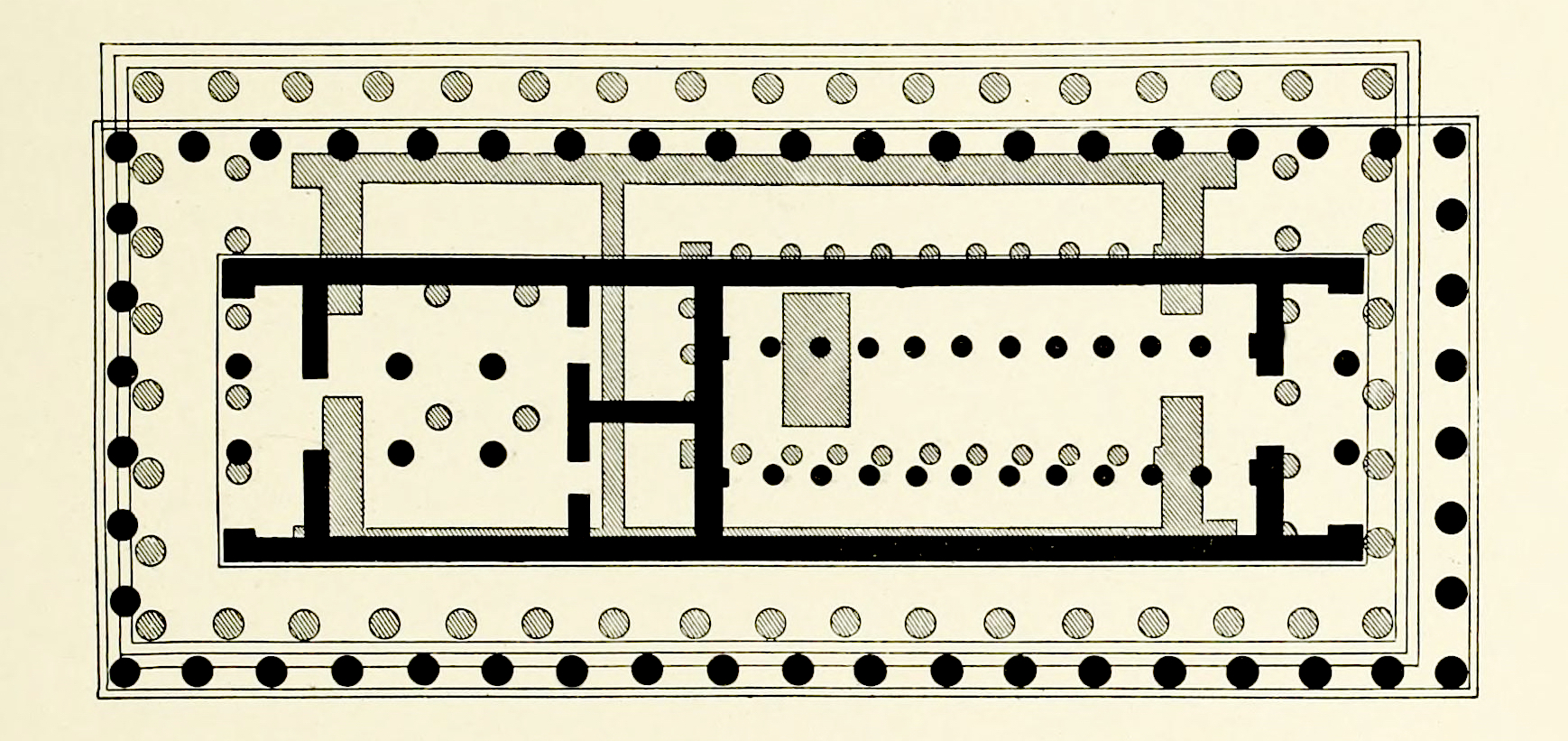 Plans superposés de l'ancien Parthénon (en noir) et du Parthénon de Périclès (en hachures). D'après Wilhelm Dörpfeld